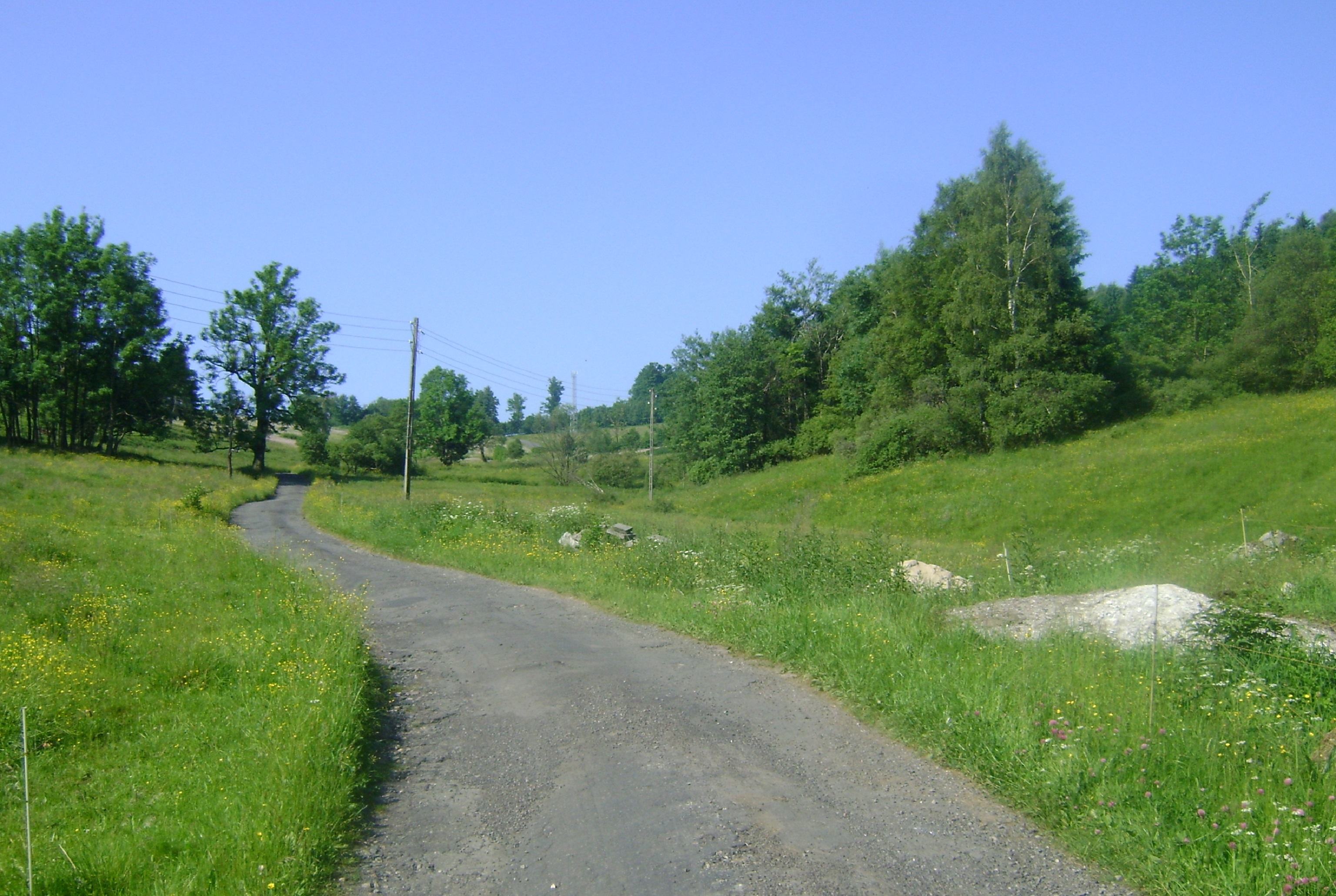 Przełęcz górska w Polsce, położona na wysokości 705 m n.p.m. w południowo-zachodniej Polsce, w Górach Bystrzyckich, w Sudetach Środkowych.